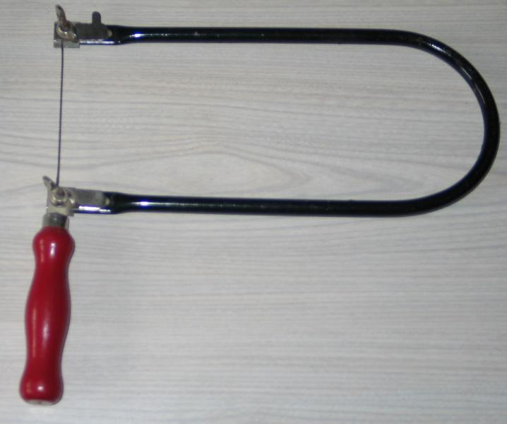 Eine Laubsäge